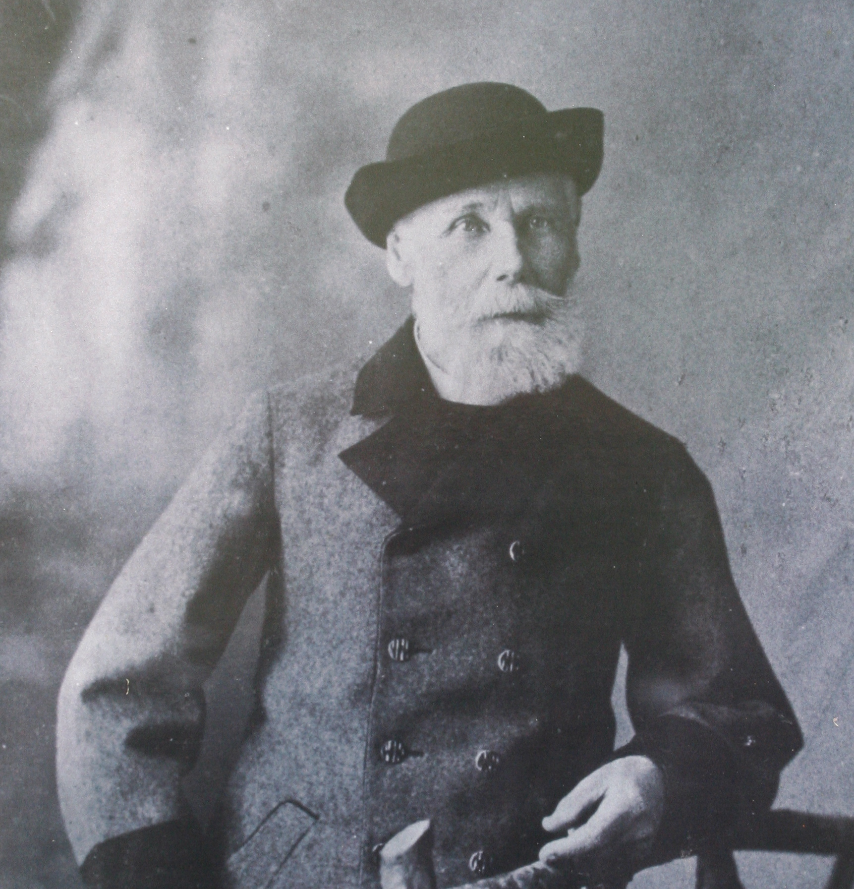 Wildpark Langenberg Forstmeister Carl Anton Ludwig von Orelli, (1808 - 28.1.1890), Gründer des Tierparks